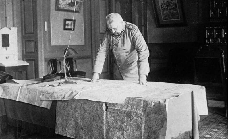 Hindenburg im Hauptquartier in Kowno, 1915